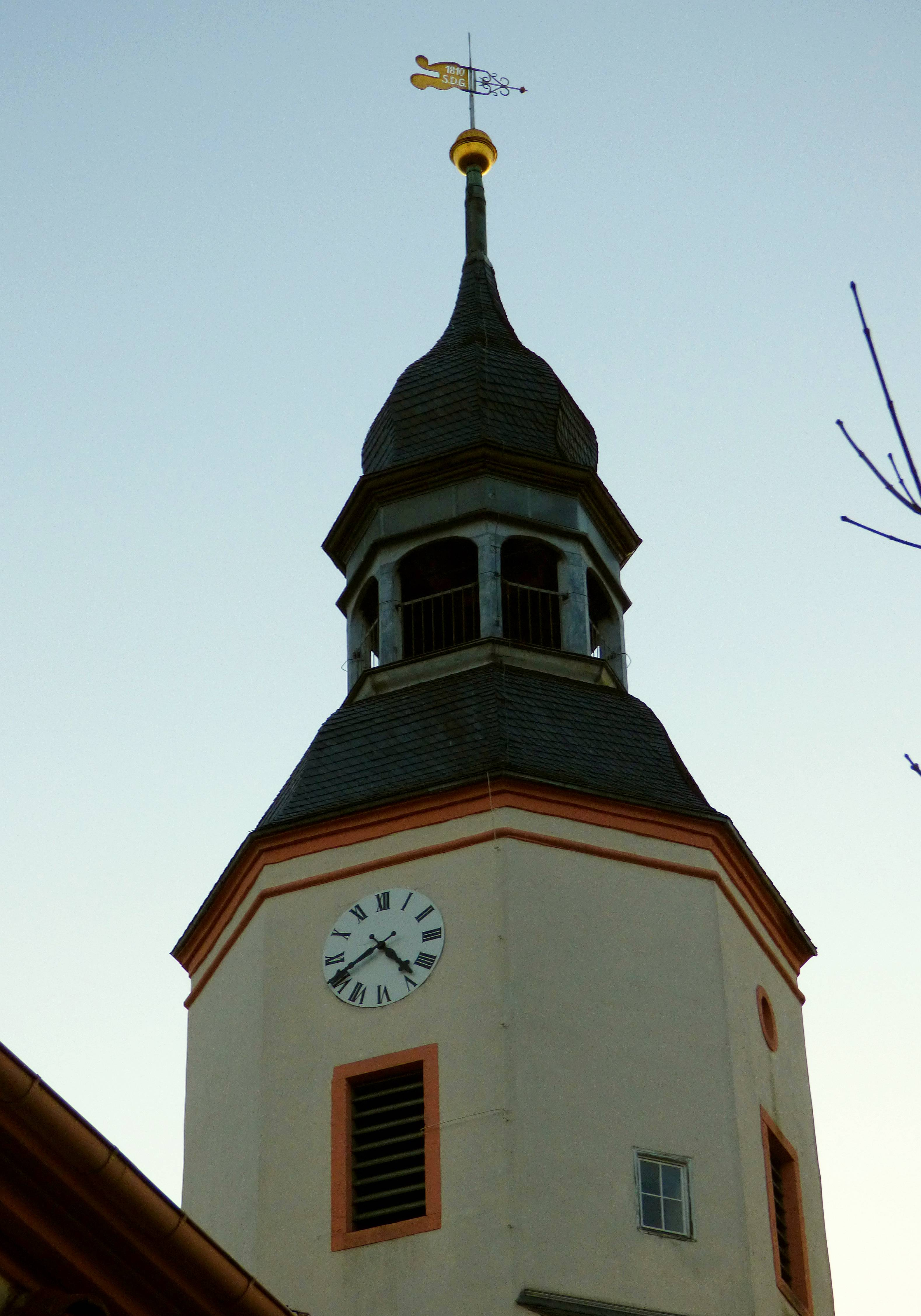 Turm der Dorfkirche Fichtenberg (Mühlberg/Elbe)